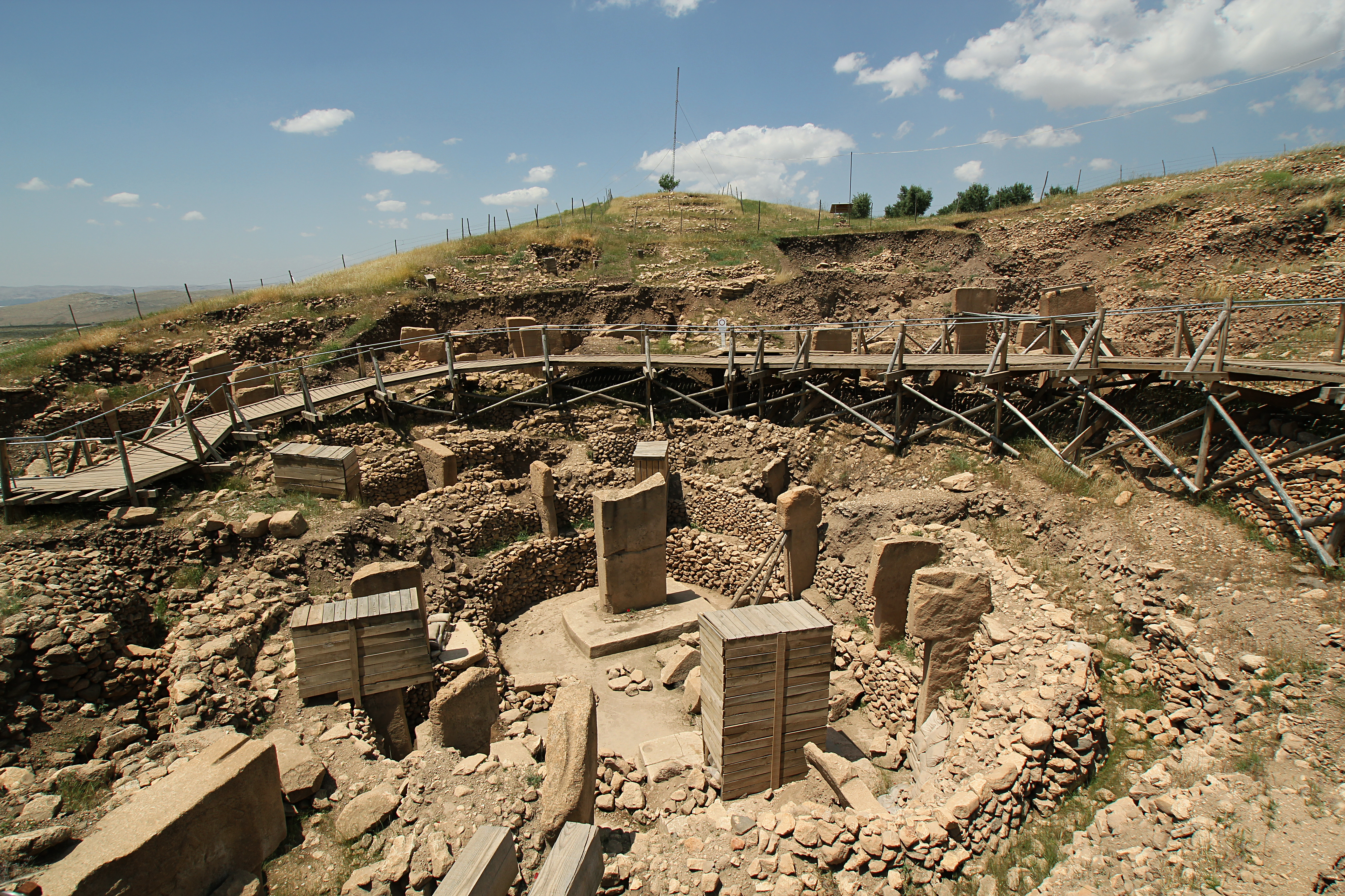 Göbekli Tepe, Siedlungshügel bei Şanlıurfa, Südosttürkei, Anlage C von Osten, hinter dem Holzsteg (von links) A, B und D